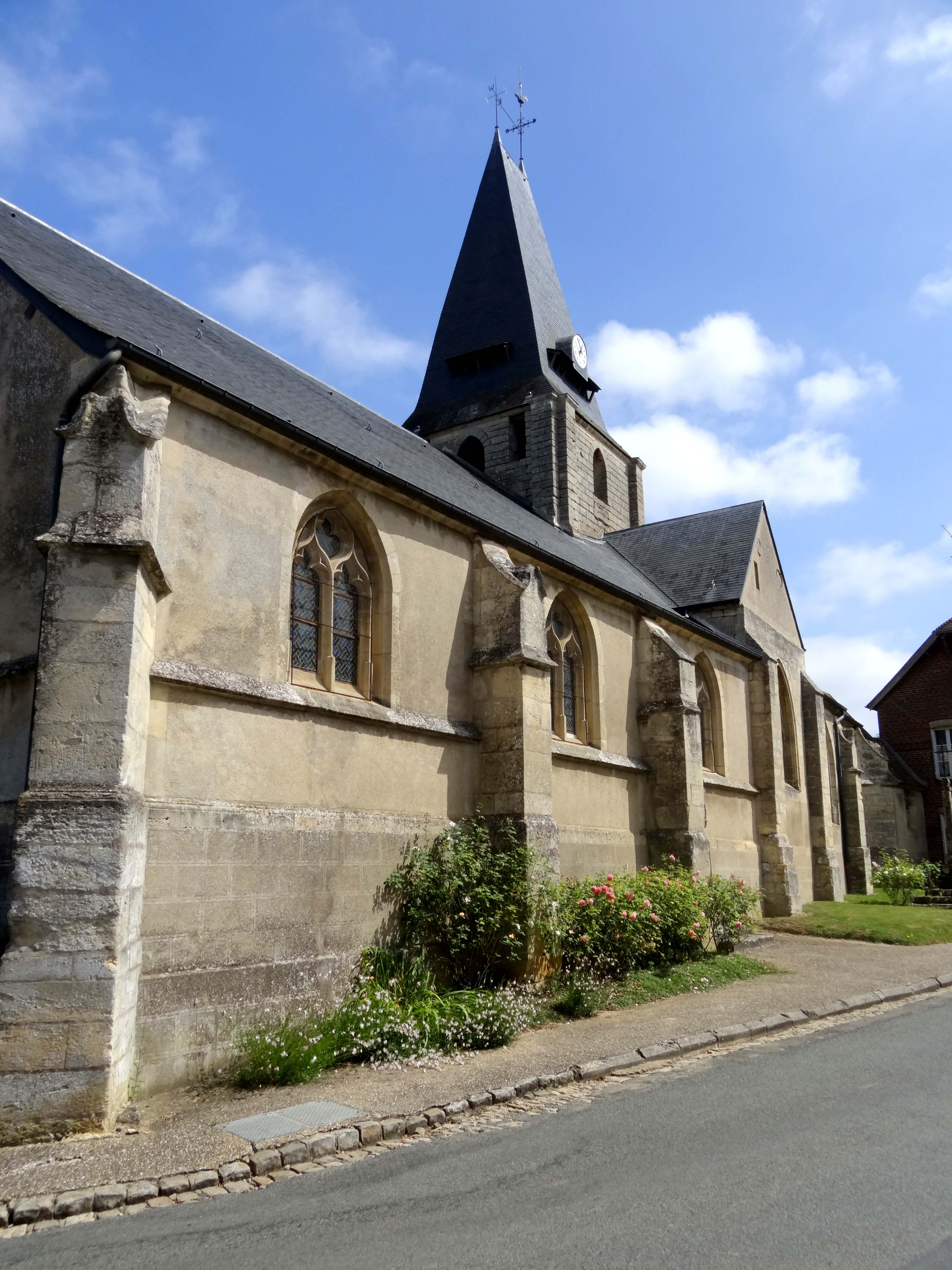 Église Saint-Germain de Boury-en-Vexin - voir titre.